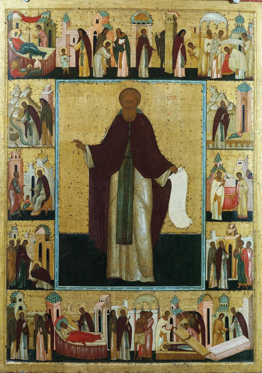 Преподобный Сергий Радонежский в житии. Москва, 1480-90-е. Музеи Московского Кремля. Происходит из Успенского собора Московского Кремля